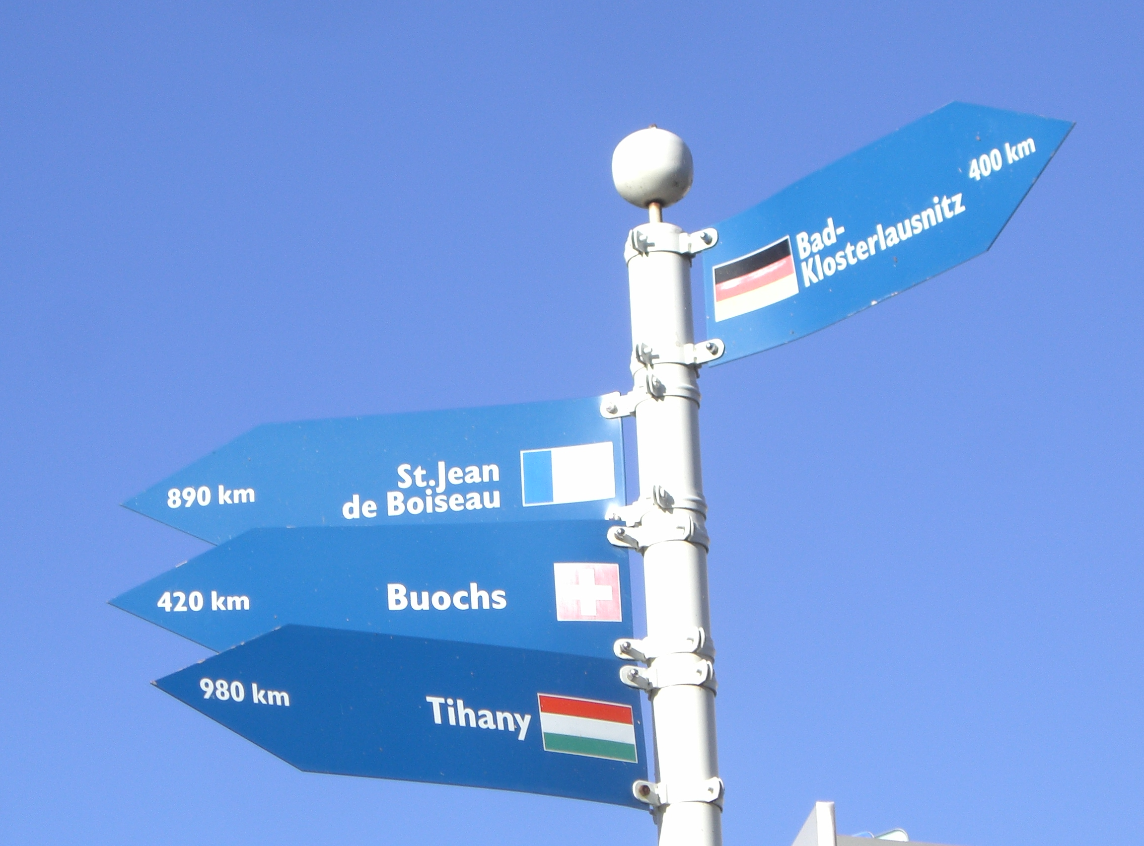 Schilder auf dem Deidesheimer Marktplatz mit den Entfernungen zu Deidesheims Partnerstädten.